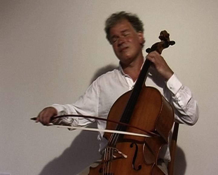 Violoncelle avec l'archet BACH